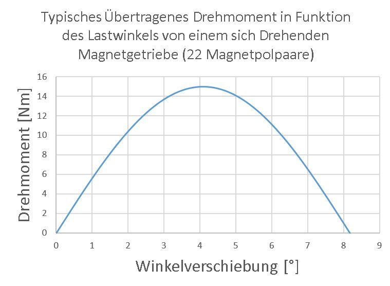 Übertragenes Drehmoment